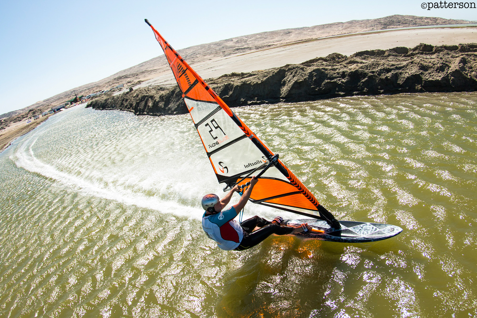 Christian Bornemann - Wide